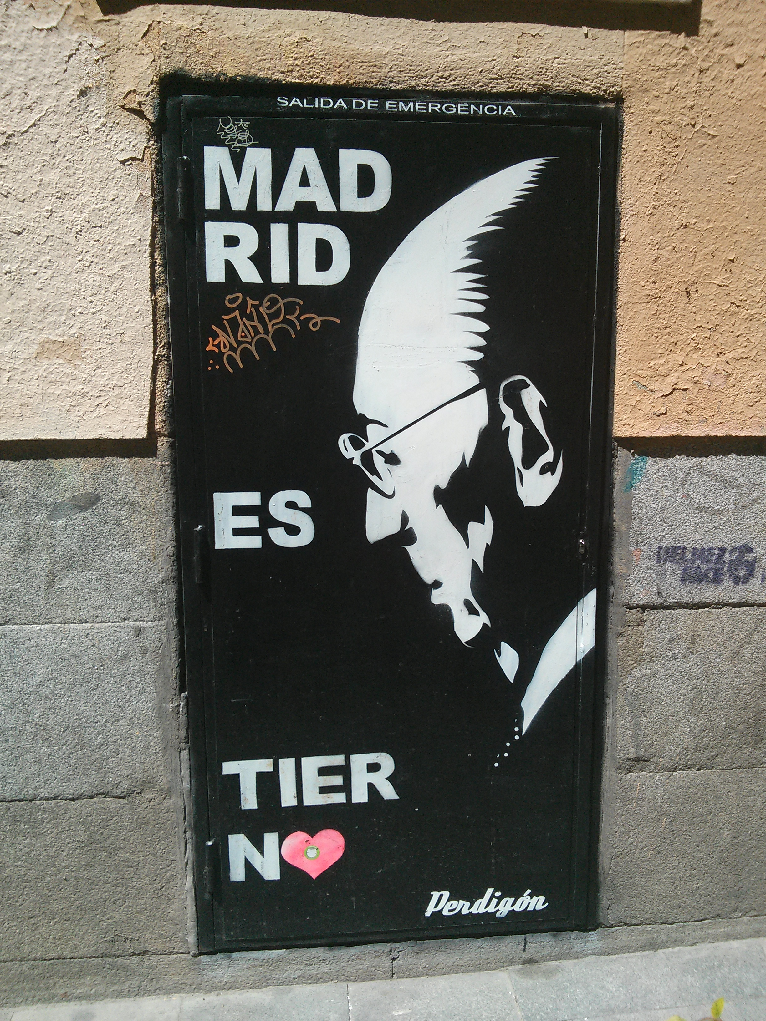 Fotografía de un grafitti que homenajea al alcalde de Madrid Tierno Galvan